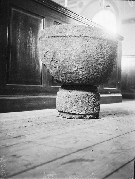 Dopfunt, medeltida. Kategori: (04) DopfuntarDopfunt, medeltida.